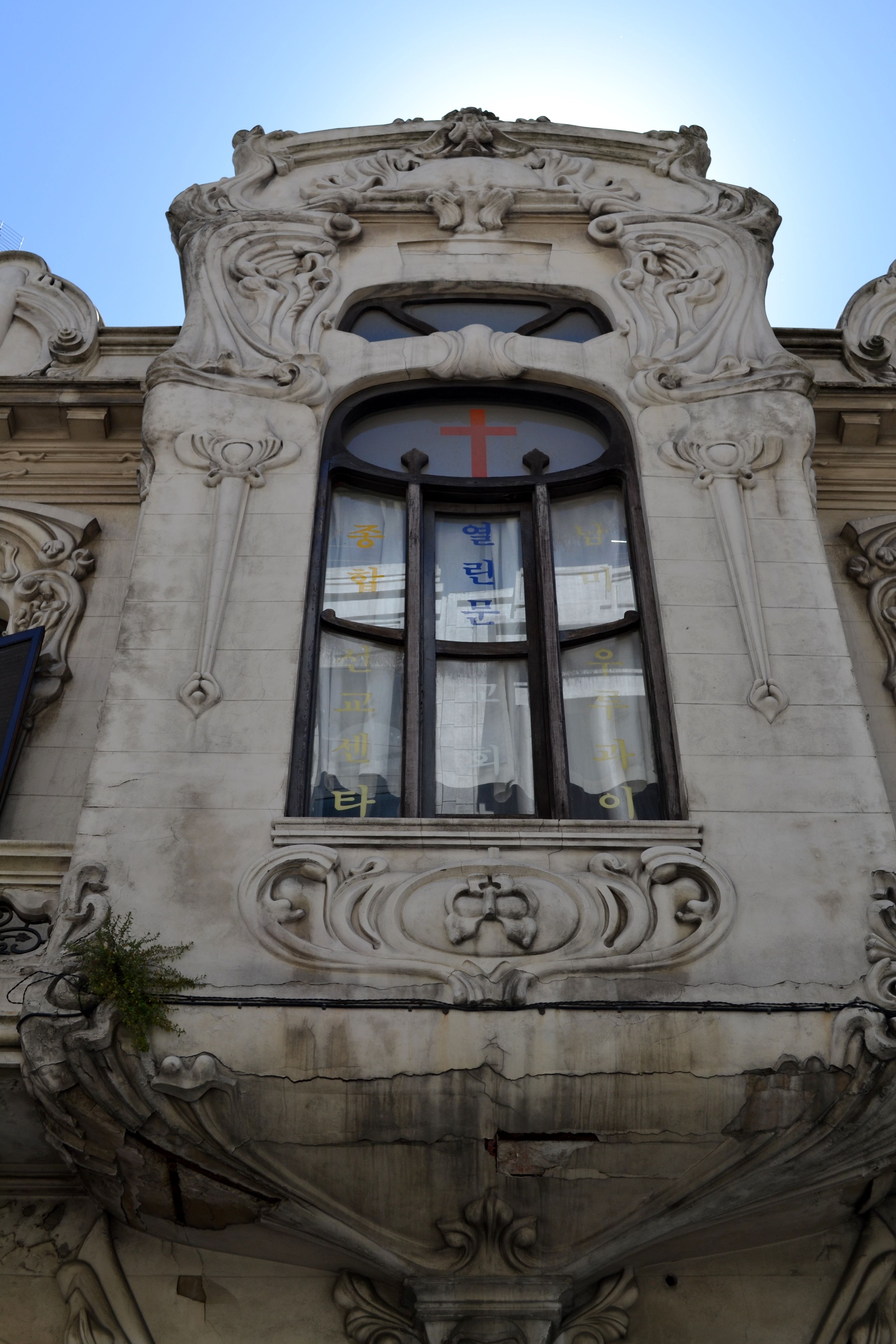 Arquitectos Horacio Acosta y Lara, y A.Guerra Romero 1905